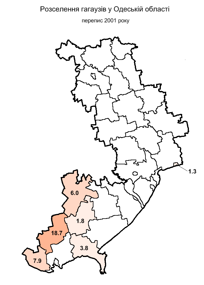 Розселення гагаузів в Одеській області за переписом 2001 р. / Gagauz people in Odesa oblast, 2001 census